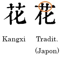 Variantes du sinogramme fleur (forme Kangxi, forme traditionnelle japonaise)